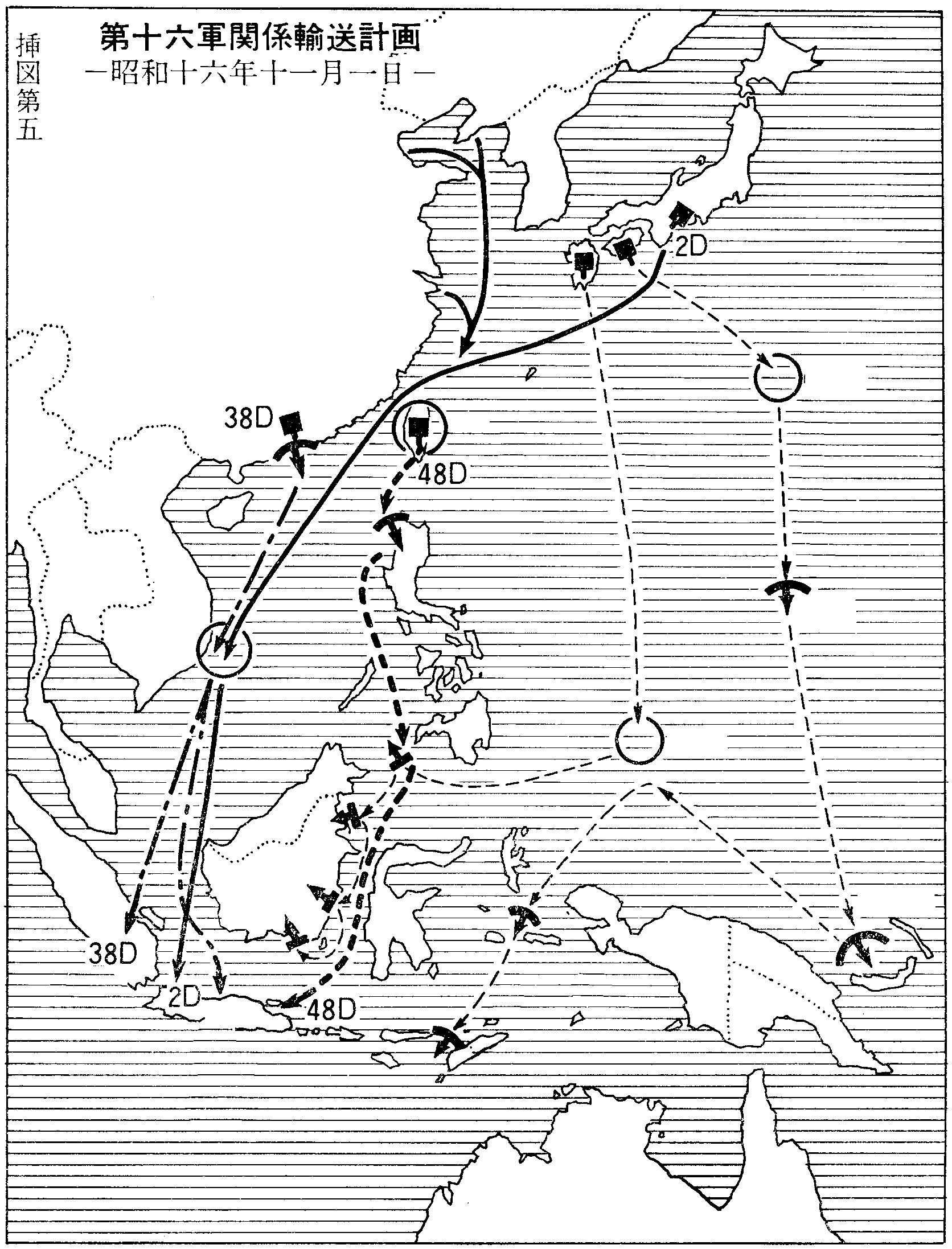 Senshi Sōsho volume 3, “The Invasion of the Dutch East Indies”, The Corts Foundation/Leiden University Press, 2015, pp. 68, 16th. Army.